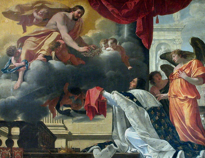 Saint Louis recevant la couronne d'épines des mains de Jésus, Simon Vouet, 1639, église Saint-Paul-Saint-Louis, Paris